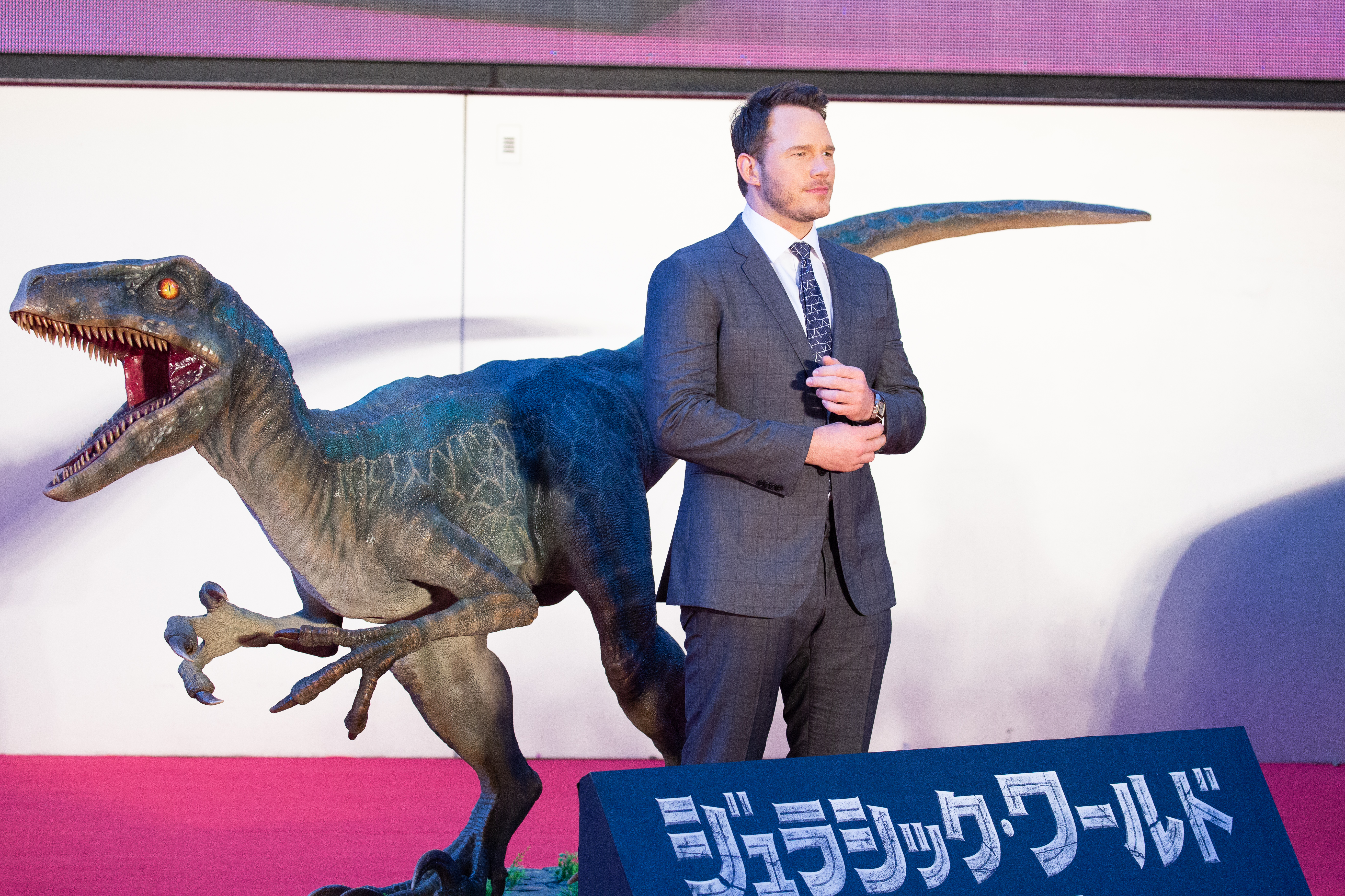 ジュラシック・ワールド/炎の王国 ジャパン・プレミア レッドカーペット クリス・プラット